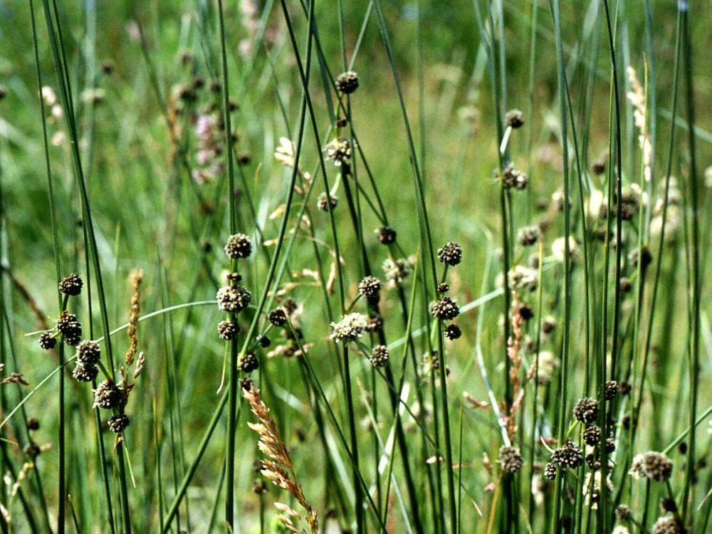 Kugelbinse (Scirpoides holoschoenus, Syn.: Holoschoenus romanus), Sauergräser (Cyperaceae) - Österreich/Austria/Autriche: Burgenland, Seewinkel, Illmitz